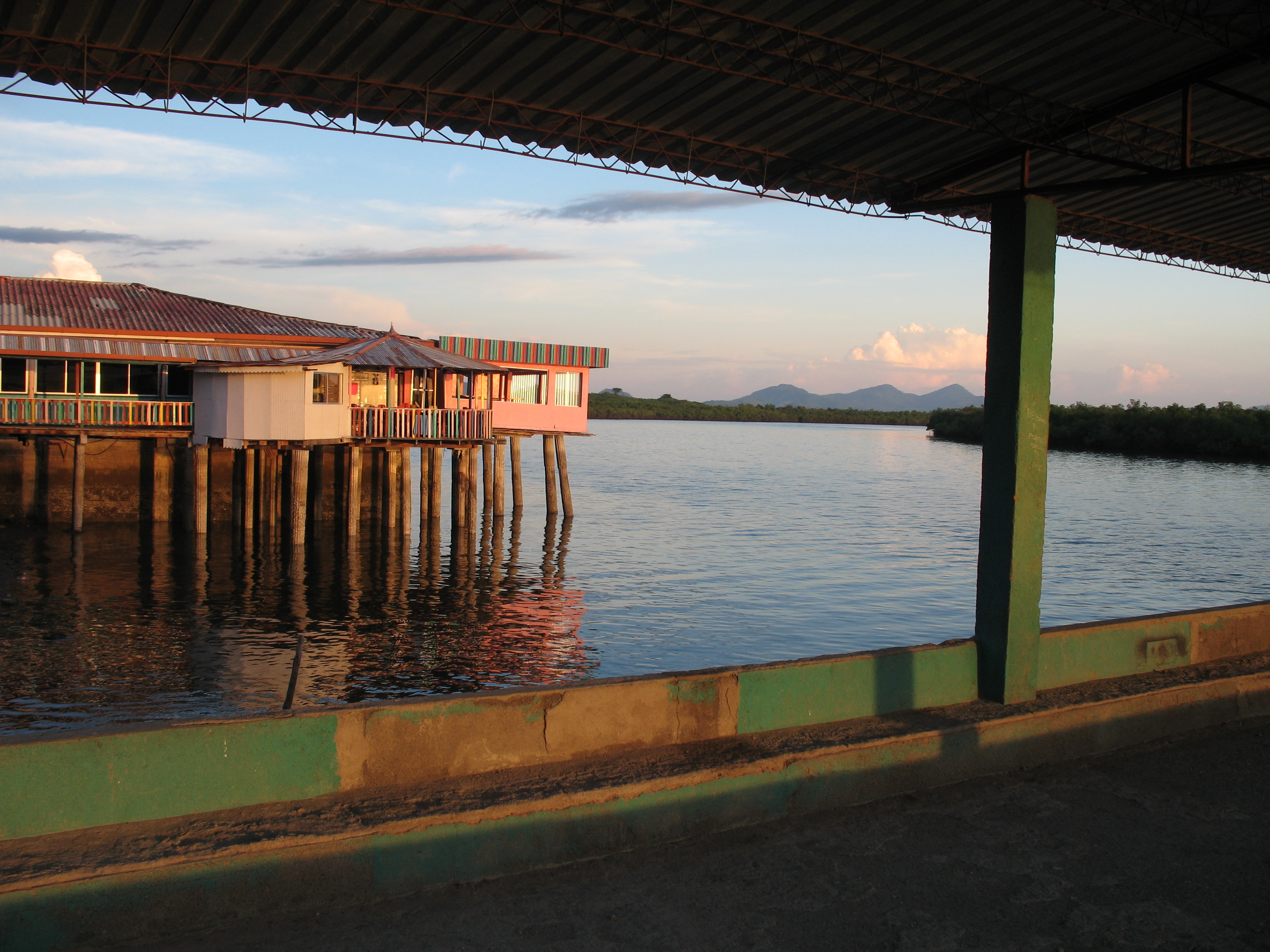 Muelle de San Lorenzo-Valle, Honduras. Photo by : Dennis Garcia.